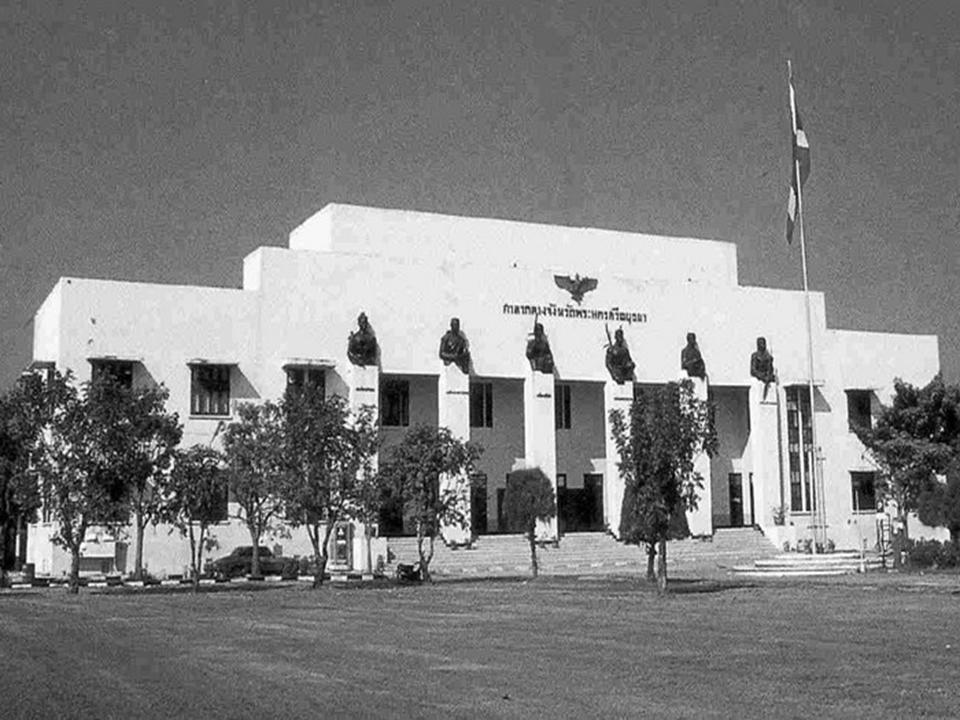 Phra Nakhon Si Ayutthaya City Hall